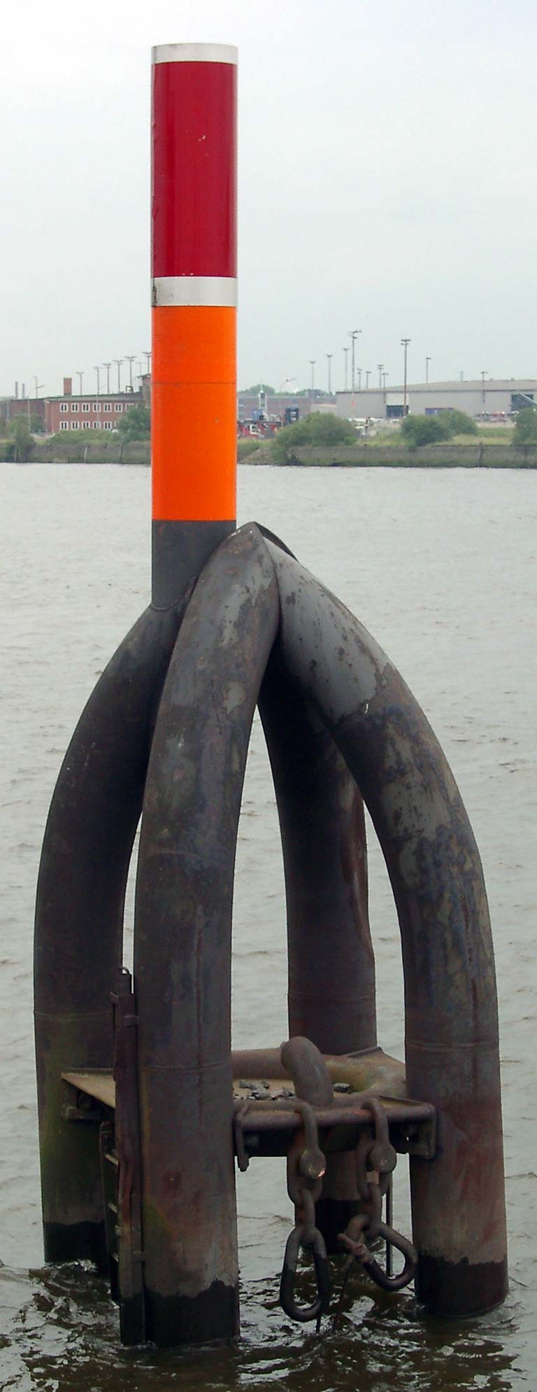 Dalben